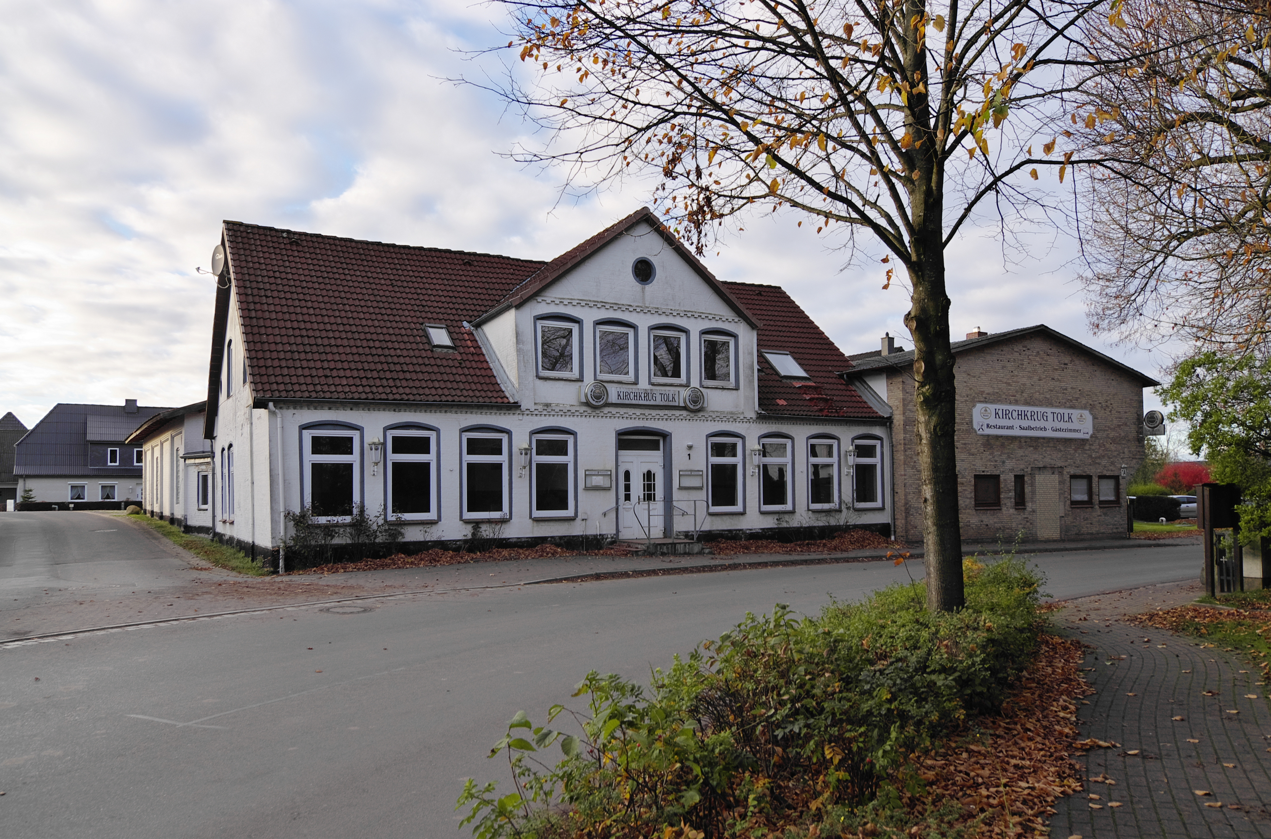 Kirchenkrug in Tolk, Kreis Schleswig-Flensburg.